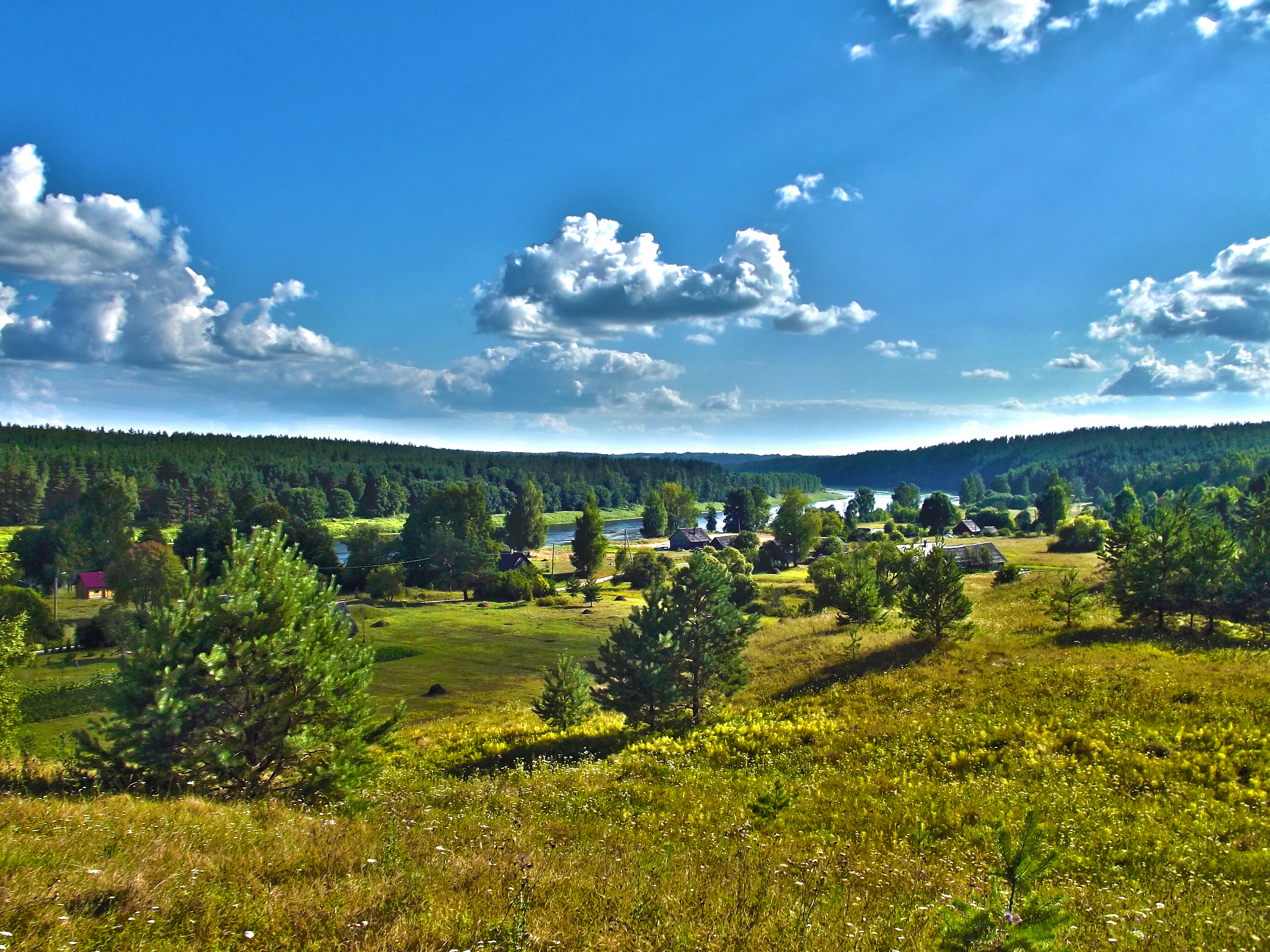 Daugavas loki